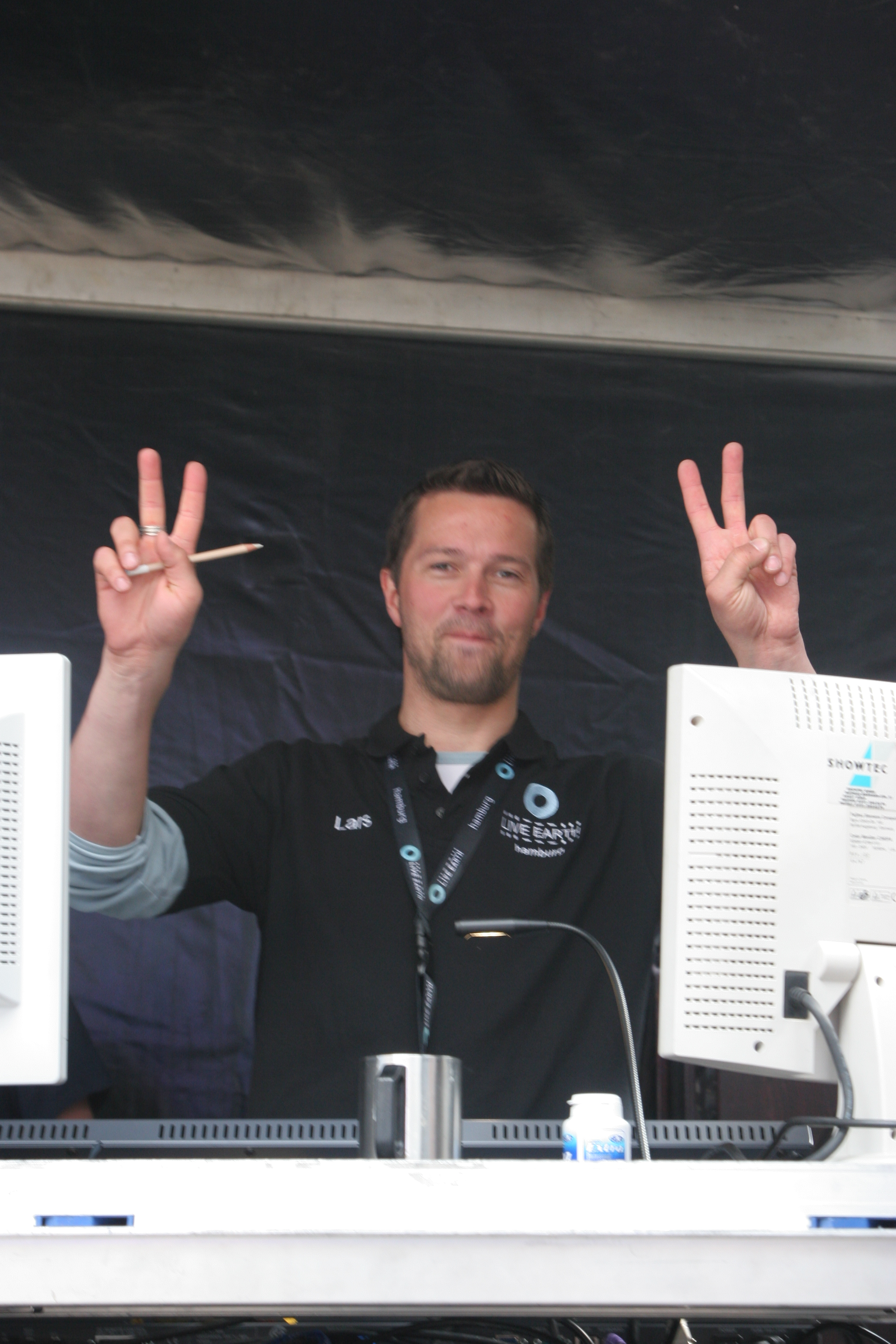 Wulff während des Live Earth in Hamburg (2007)